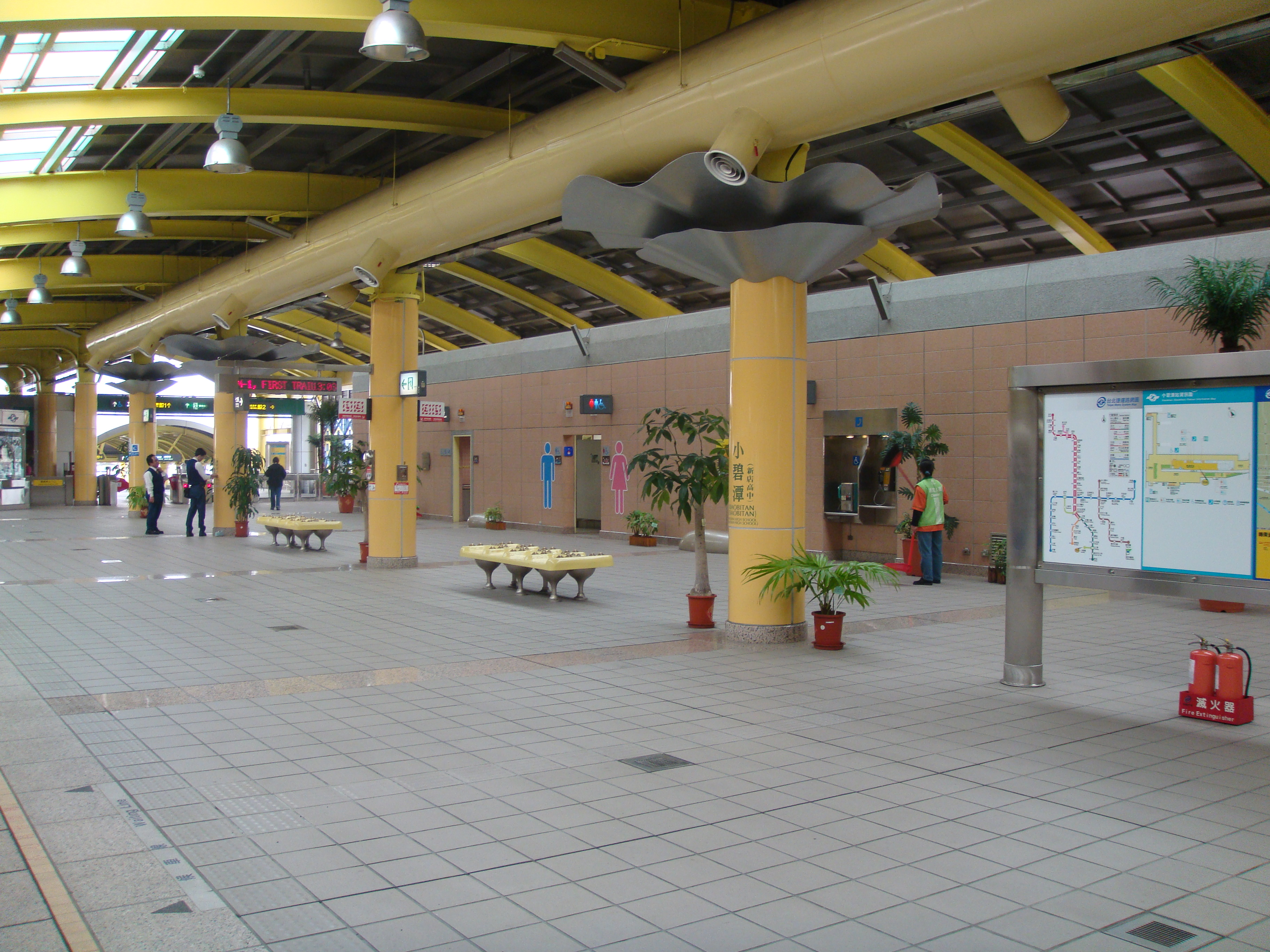 Xiaobitan Station, Xiaobitan Branch Line, Taipei Metro, Taiwan.